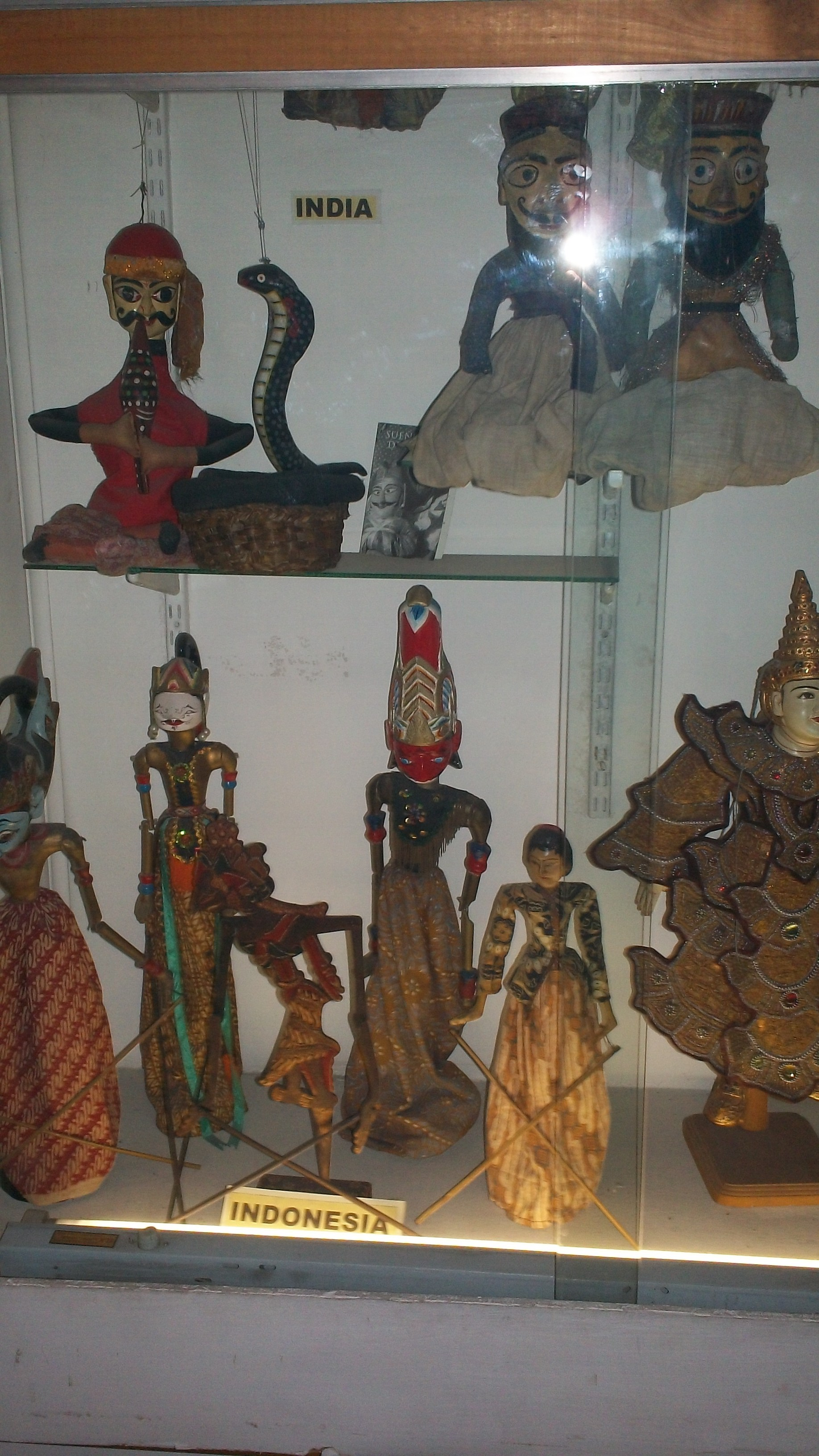 Vitrina con titeres del Museo Argentino del Titere